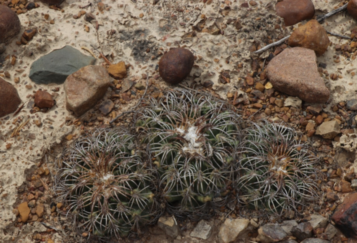 Discocactus bahiensis ssp. gracilis Bahia Brasil